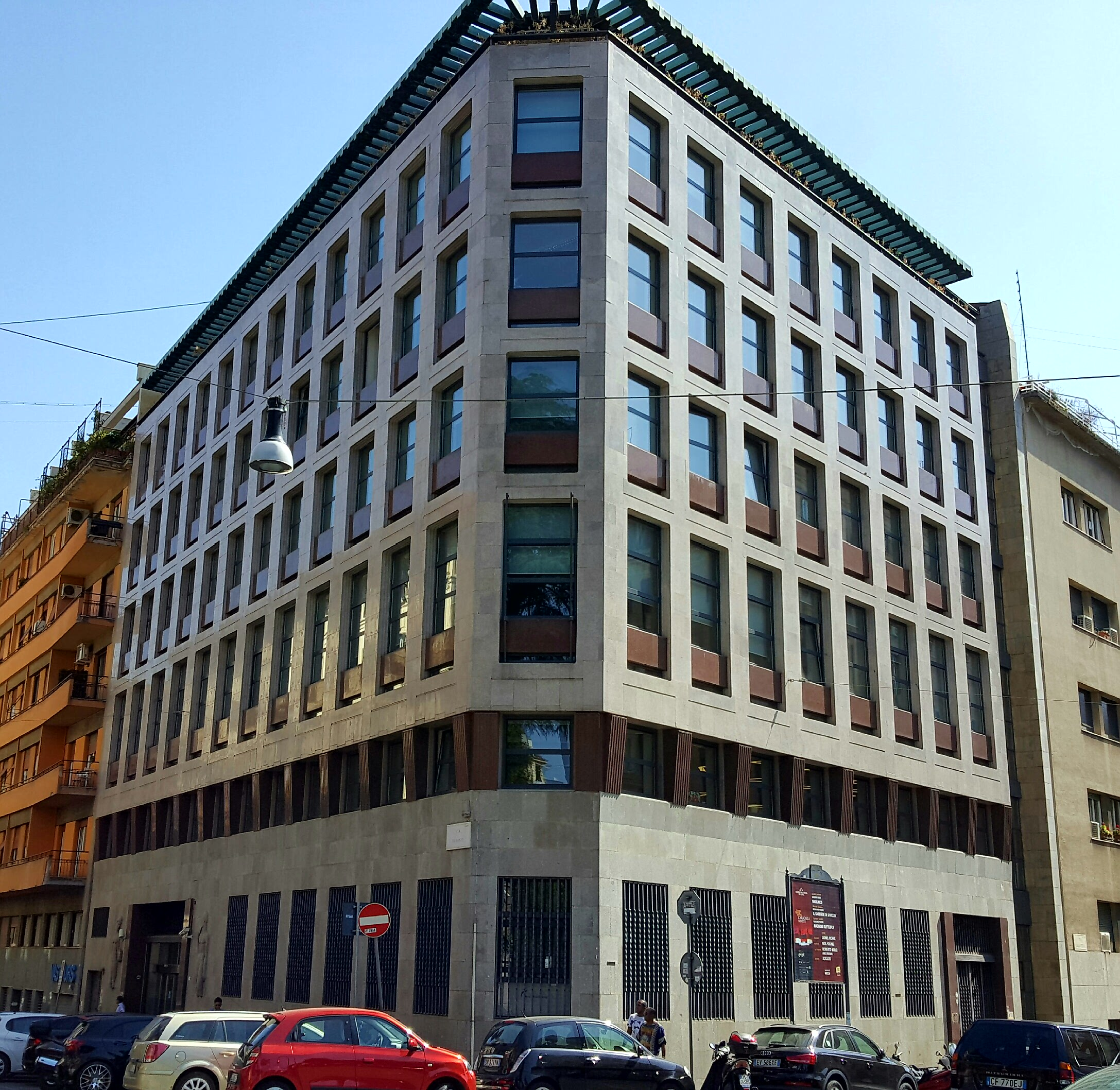 Sede Beni Stabili in Via Piemonte 38, a Roma.